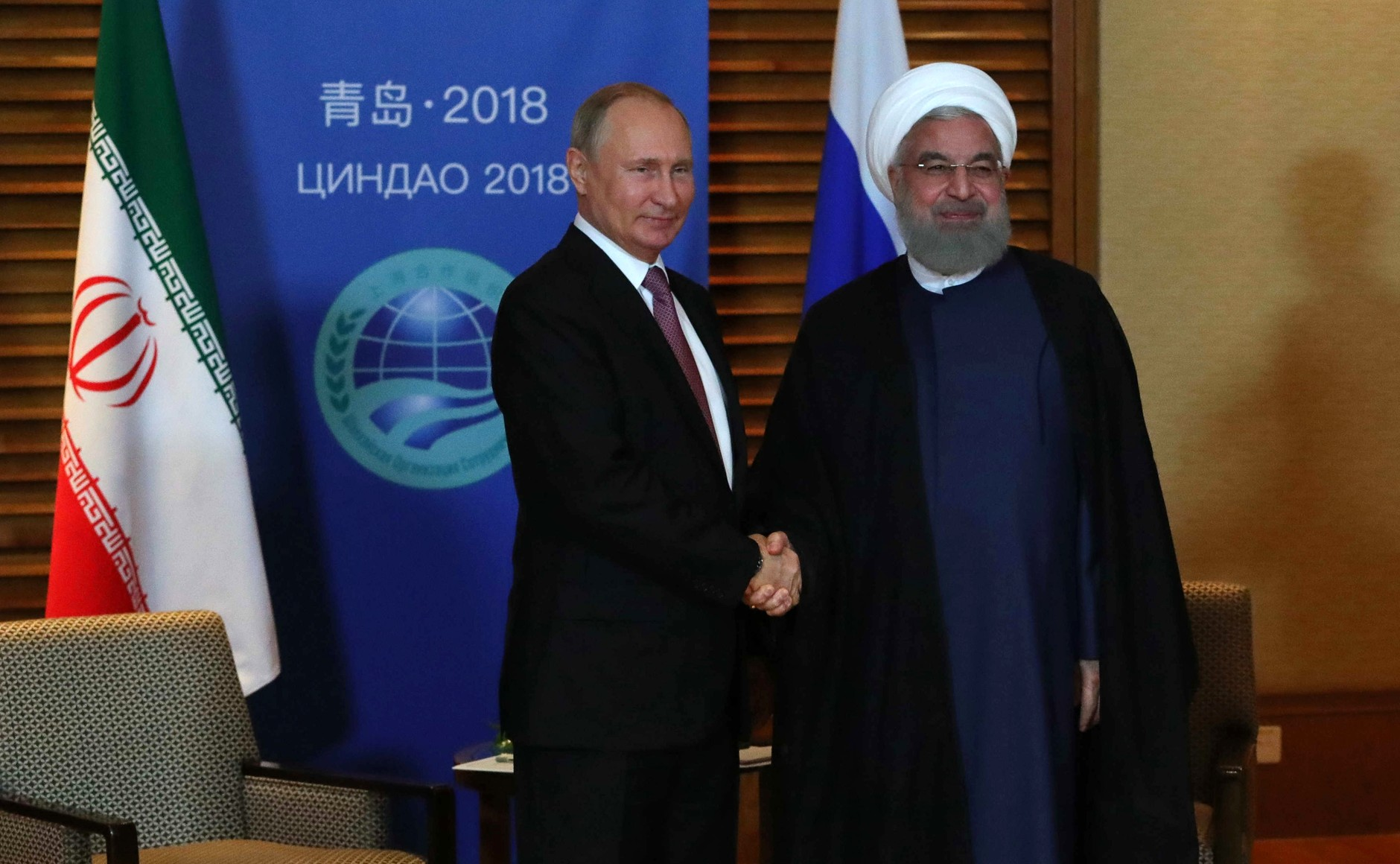 В Циндао на полях саммита ШОС состоялась встреча Владимира Путина с Президентом Ирана Хасаном Рухани